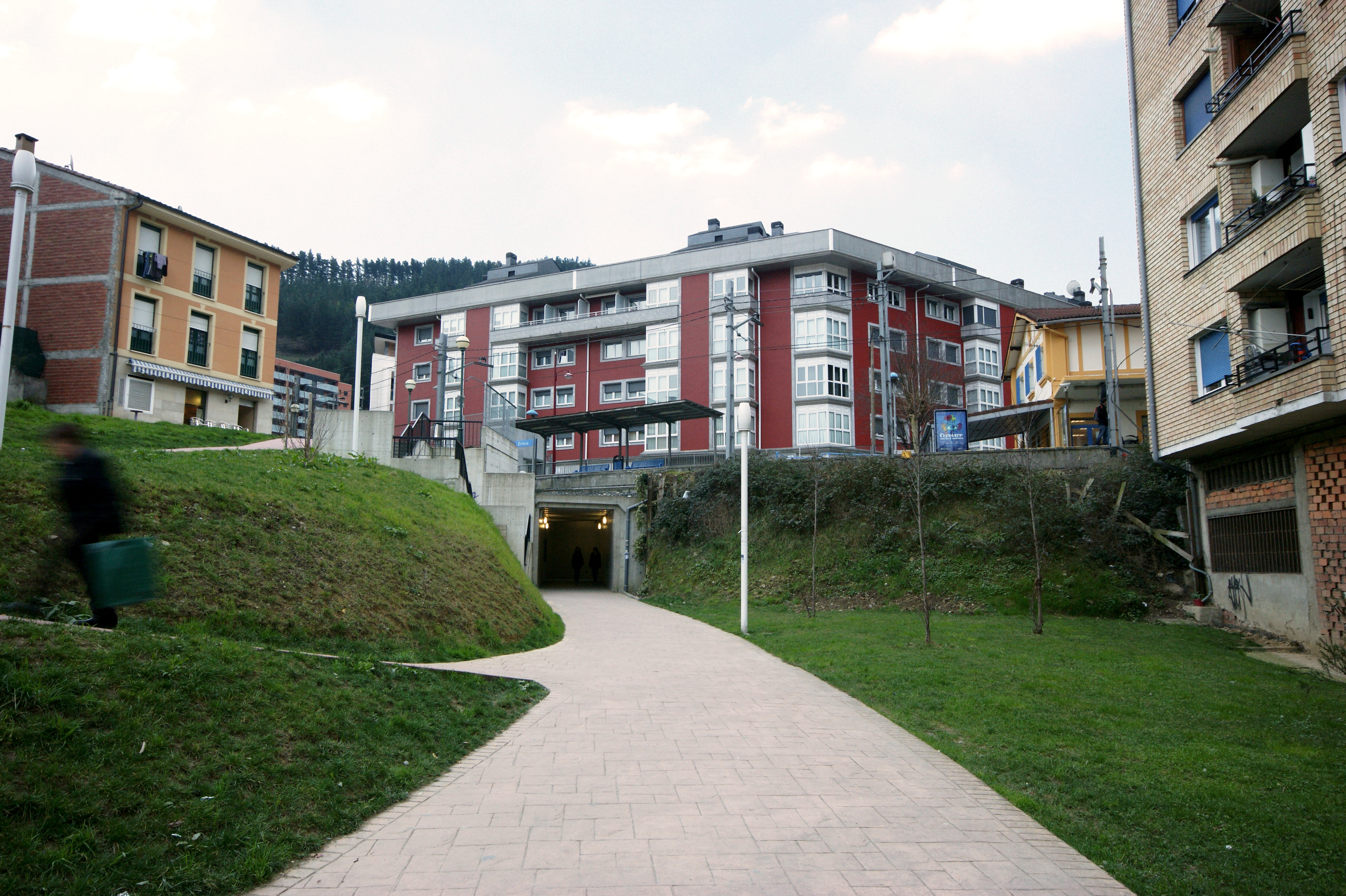 Ermuko geltokiaren sarrera